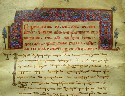 ნუსხური დამწერლობის მაგალითი. ძირითადი ტექსტი შესრულებულია ნუსხურად, სათაური და საზედაო ასო კი ასომთავრულით